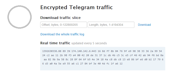 Página acerca del tráfico de Telegram para el Cryptoanálisis realizado en diciembre de 2013.